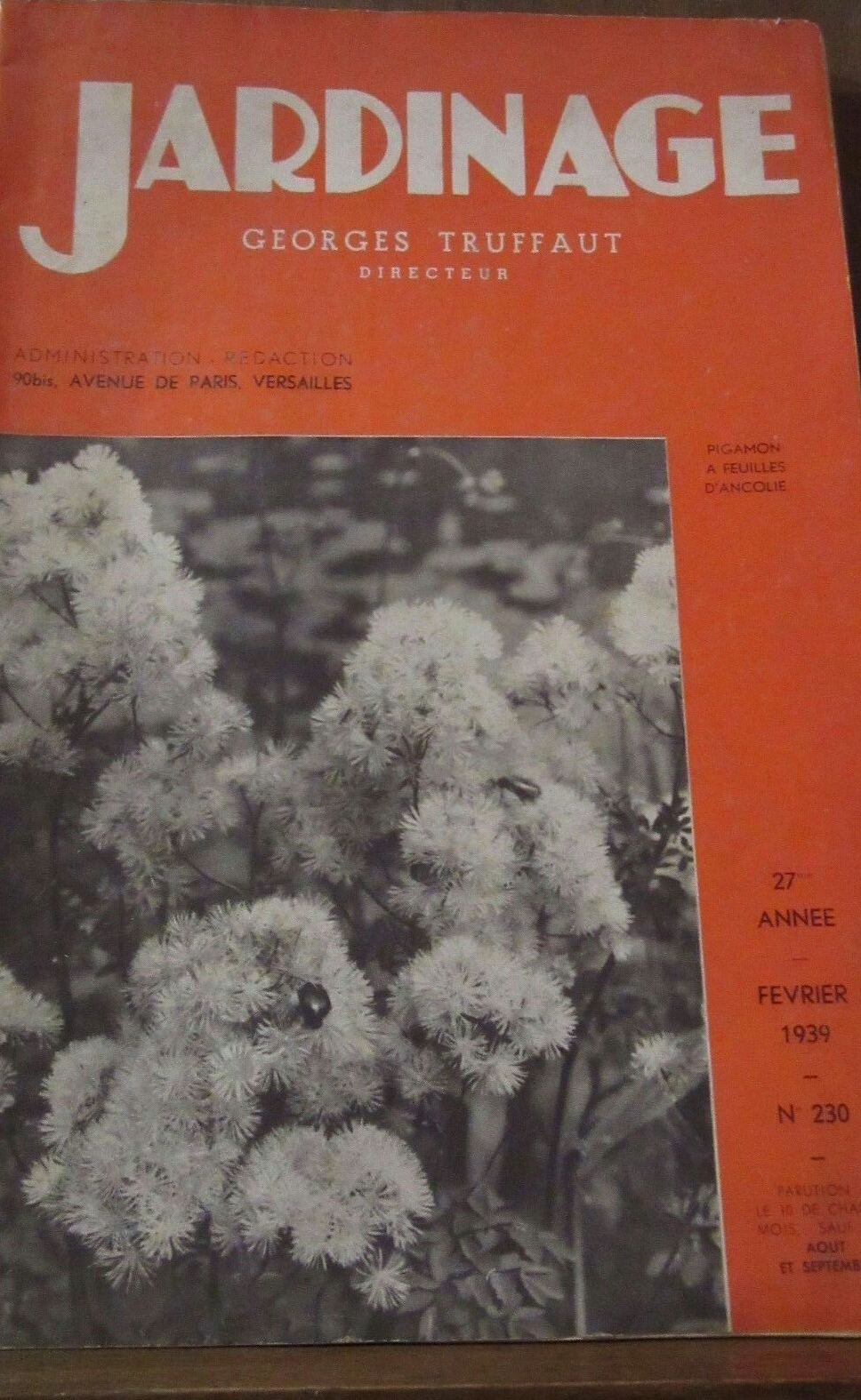 Revue Jardinage de Truffaut numéro de février 1939.